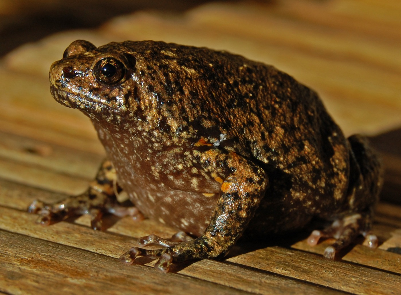 Kaloula baleata, brown bullfrog. From Gunung Betung, Lampung (south Sumatra), Indonesia